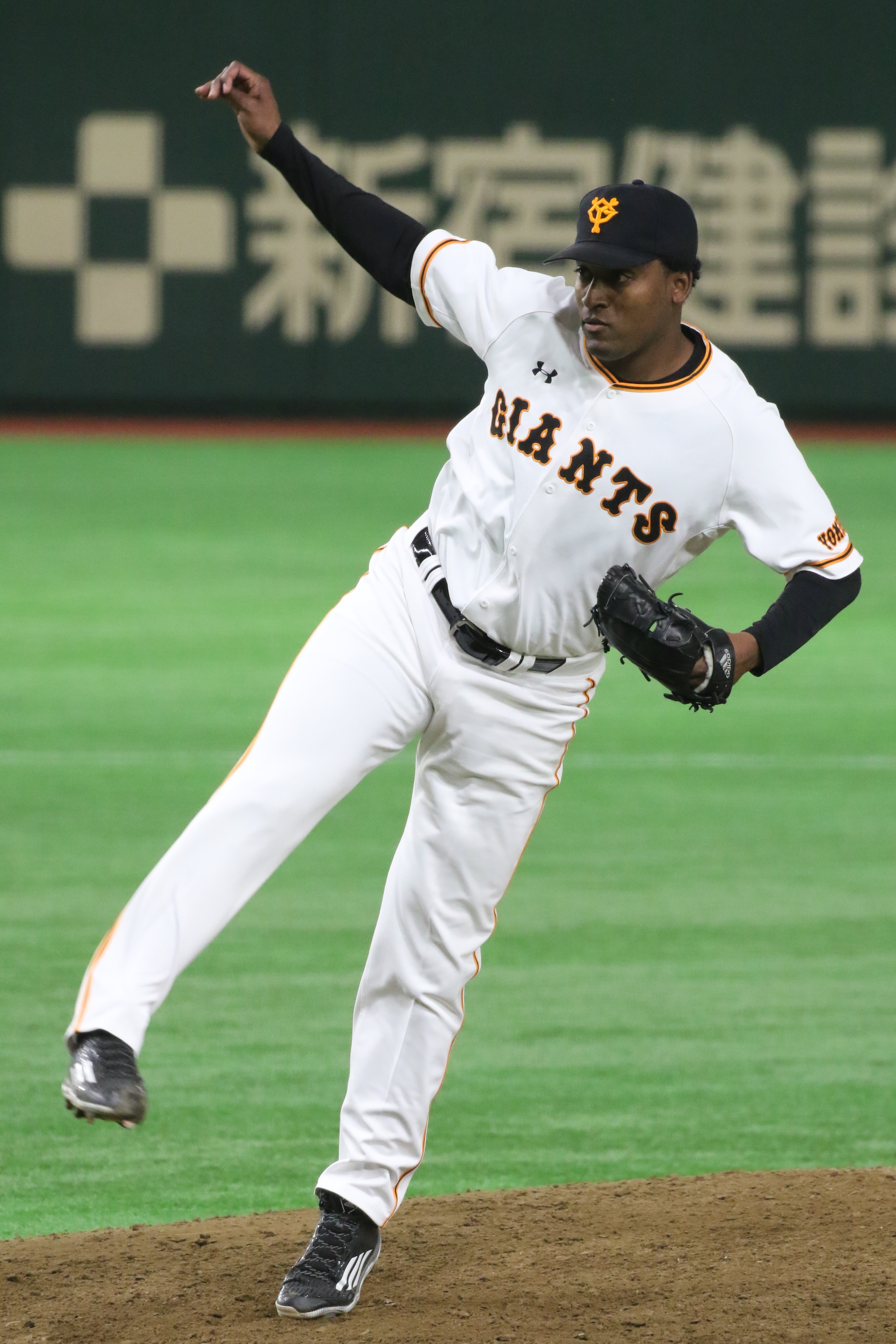 カミネロ選手